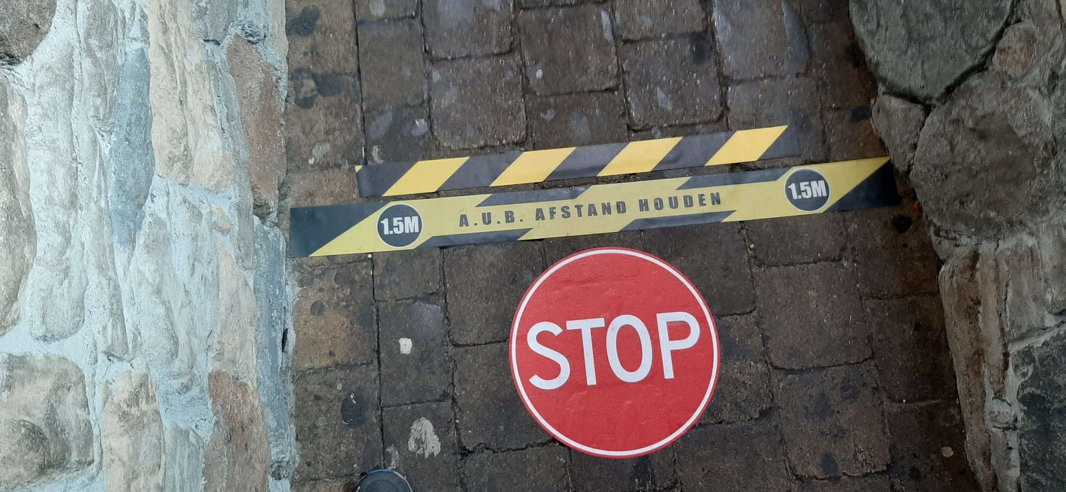 Attractiepark Toverland tijdens de coronacrisis. Stickers en waarschuwingen in de wachtrij van Maximus' Blitz Bahn.